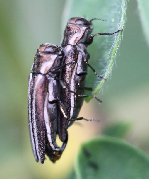 Umrandeter Schmalprachtkäfer (Agrilus cinctus) bei der Begattung an einem Besenginster am 14. Juni 2018 in der Schwetzinger Hardt